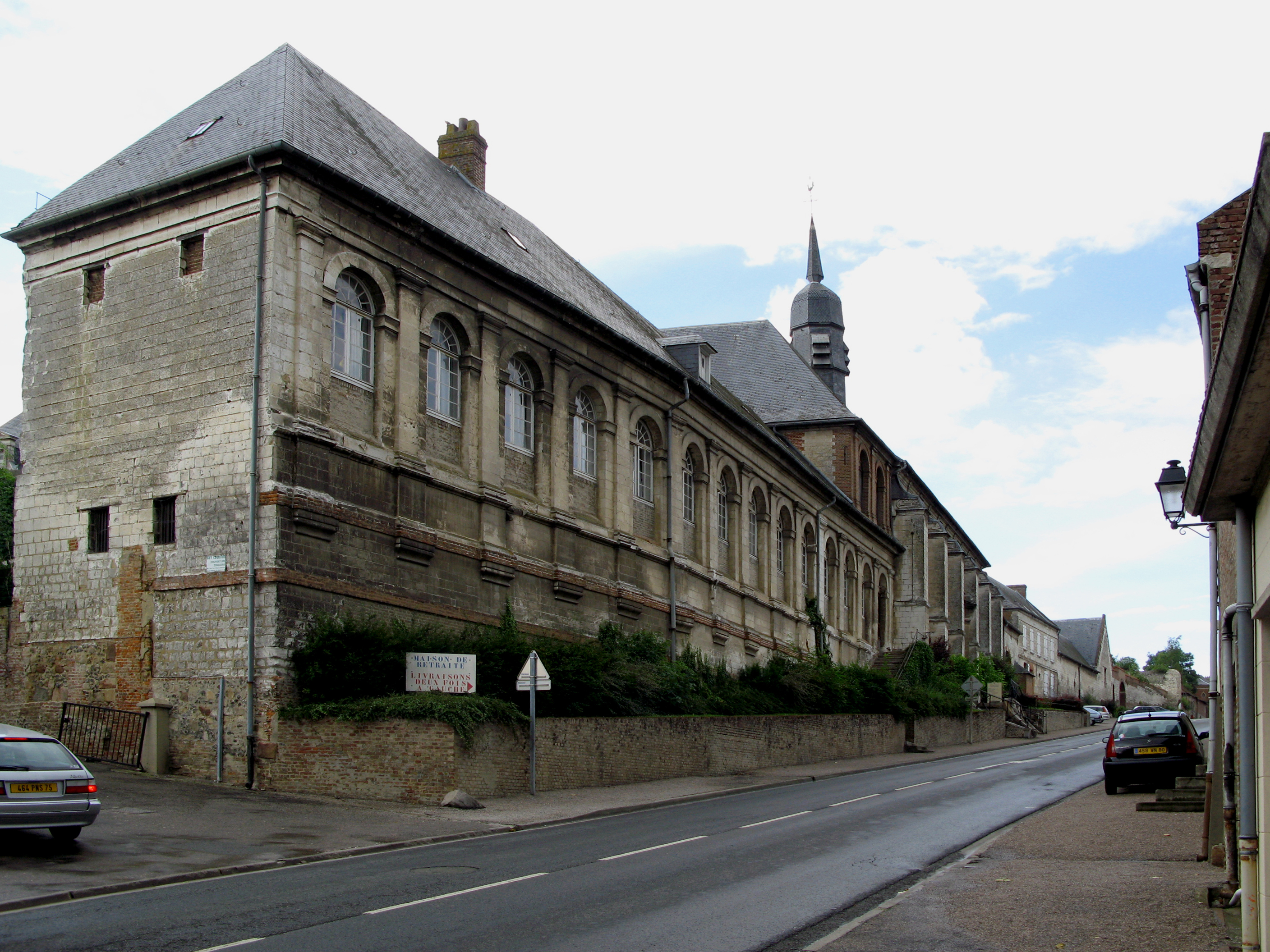 Saint-Riquier (Somme, France) - L'Hôtel-Dieu, au-delà du beffroi, sur la gauche de la rue montant vers le Nord de la ville. Photo originale transformée (perspectives redressées).